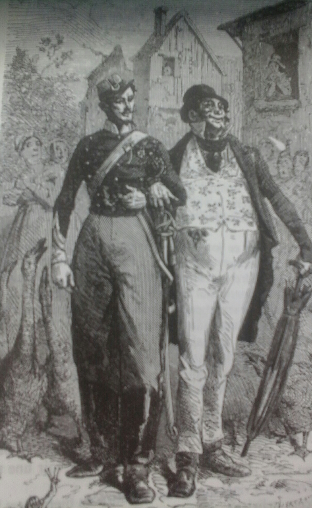 Comtesse de Ségur, Le Mauvais Génie (1867), illustrations d'Émile Bayard : Frédéric Bonard fier de montrer sa croix militaire avec son père.